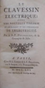 Le clavecin électrique est un instrument de musique inventé en 1759 par Jean-Baptiste Thillaie Delaborde